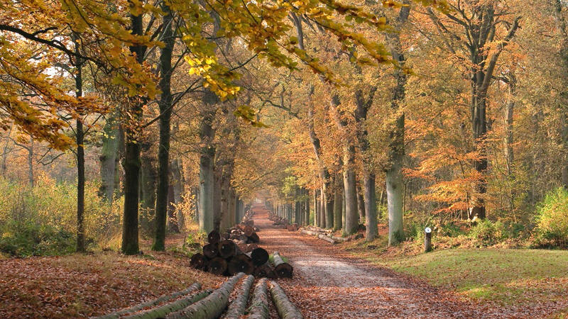 Rijsterbos bij Rijs in Gaasterland